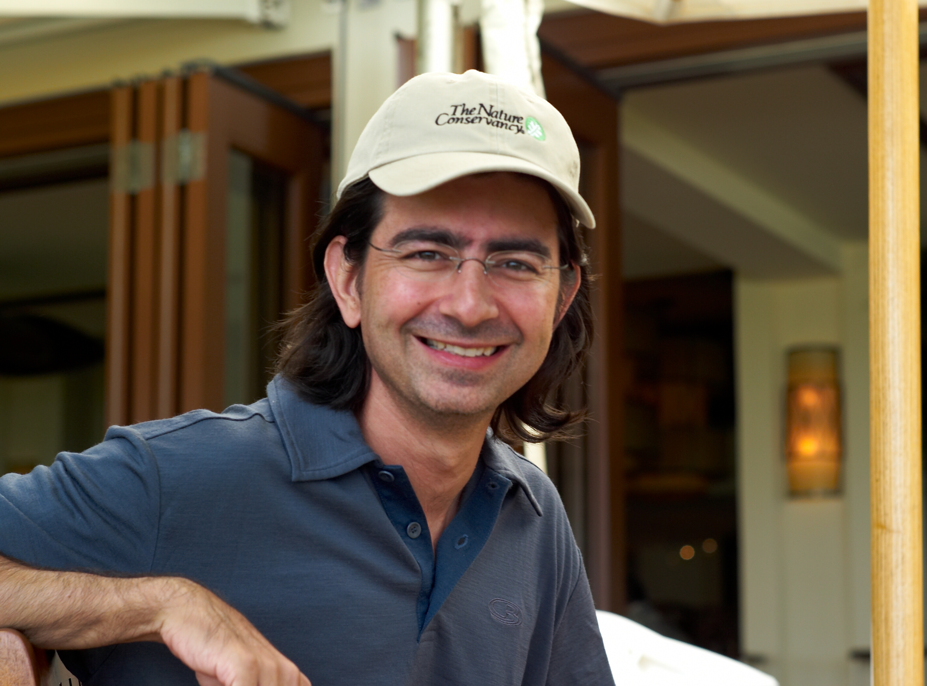 image from wiki en